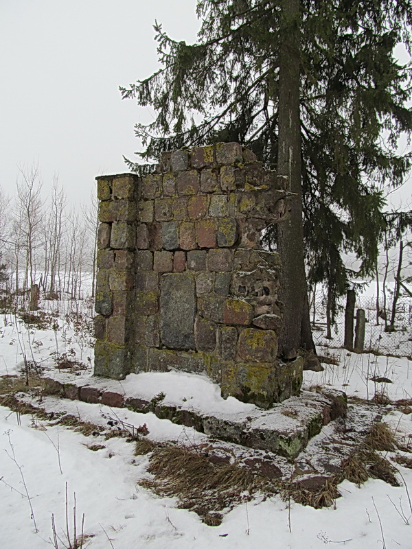 Чапунь. Помнік нямецкім салдатам